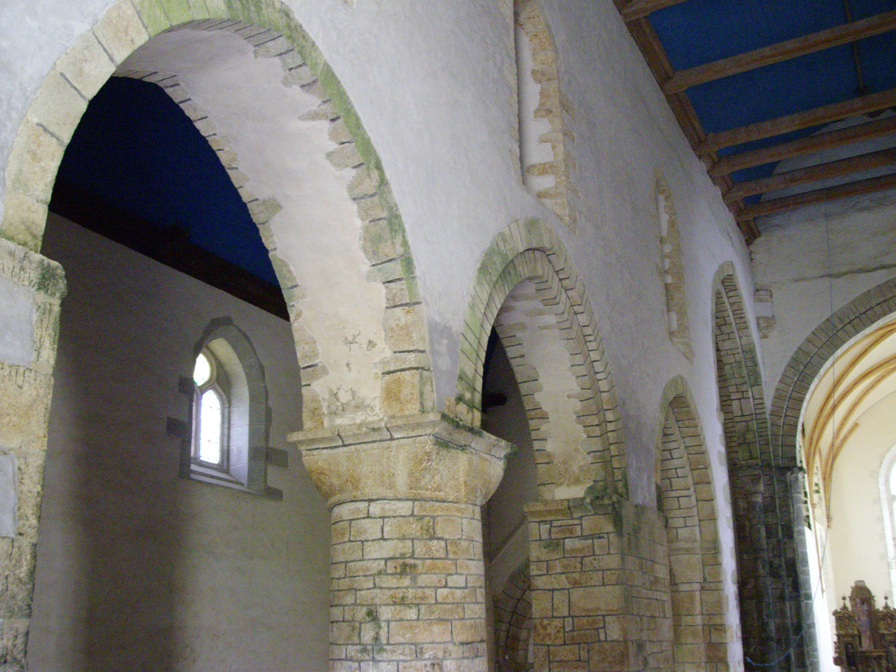 Élévation nord de la nef de l'abbatiale Notre-Dame du Relec en Plounéour-Ménez (29).